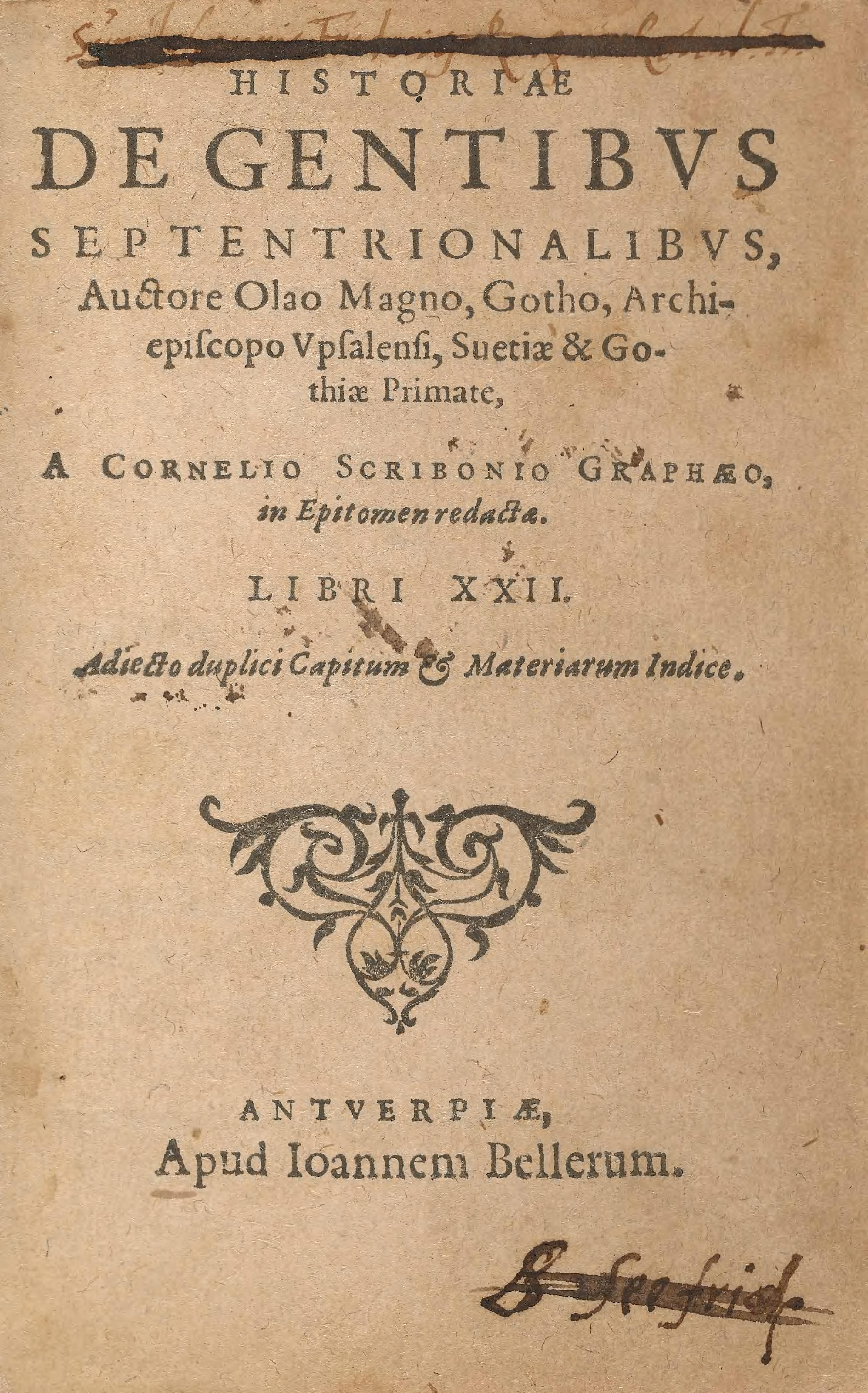 Historiae de gentibus septentrionalibus /